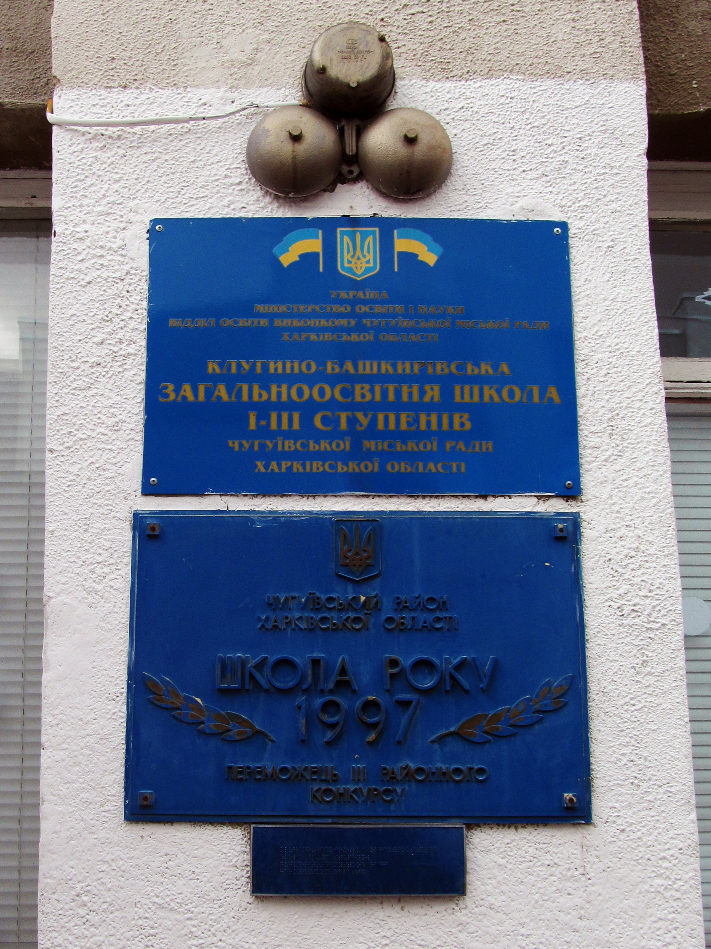 Клугино-Башкирівська загальноосвітня школа, Чугуївська міська рада Харківської області. Фото було зроблене під час поїздки для проведення віківишколу з редагування Вікіпедії для школярів Клугино-Башкирівської школи, 31 січня 2020 року.